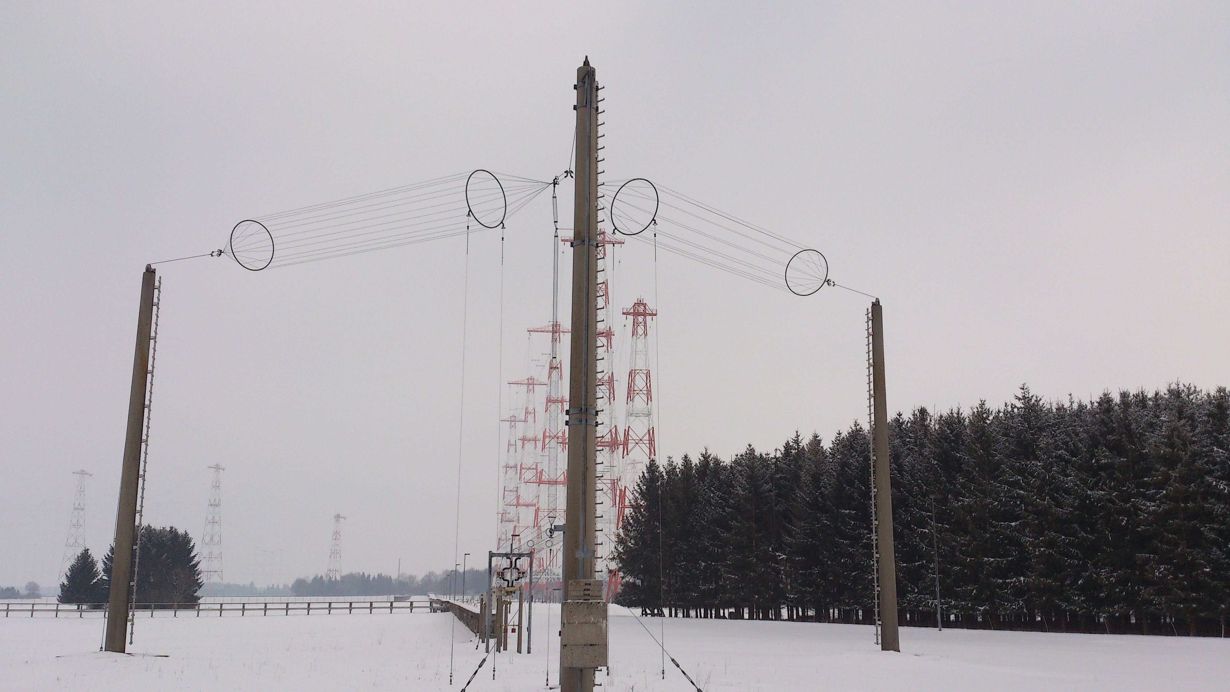 L-Dipol als Reusenantenne im Hintergrund die großen Hauptmasten der Kurzwellensendeanlage Wertachtal